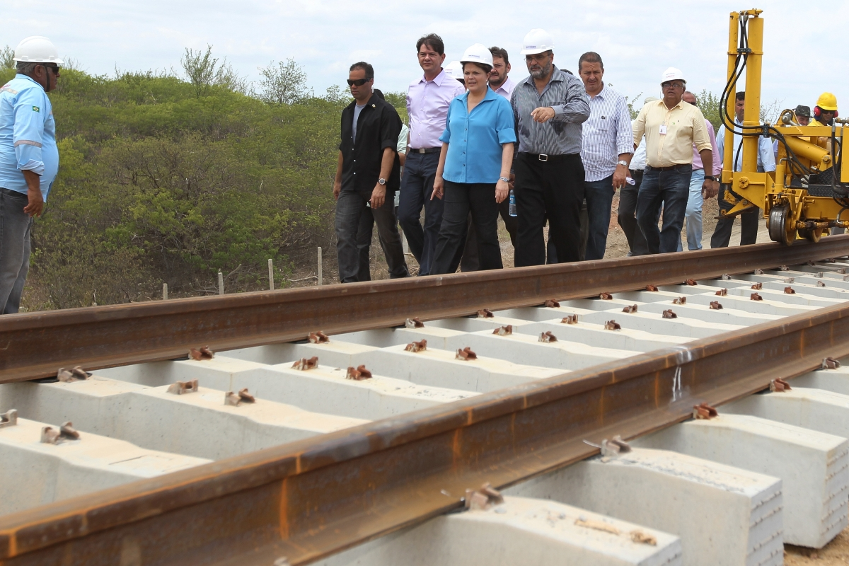 Salgueiro (PE) - Presidenta Dilma Rousseff durante vistoria à frente de lançamento da superestrutura da malha ferroviária do Lote TS1